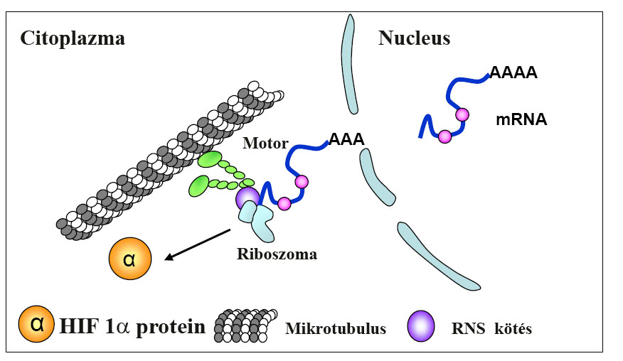 Mikrotubulus dependens transzláció